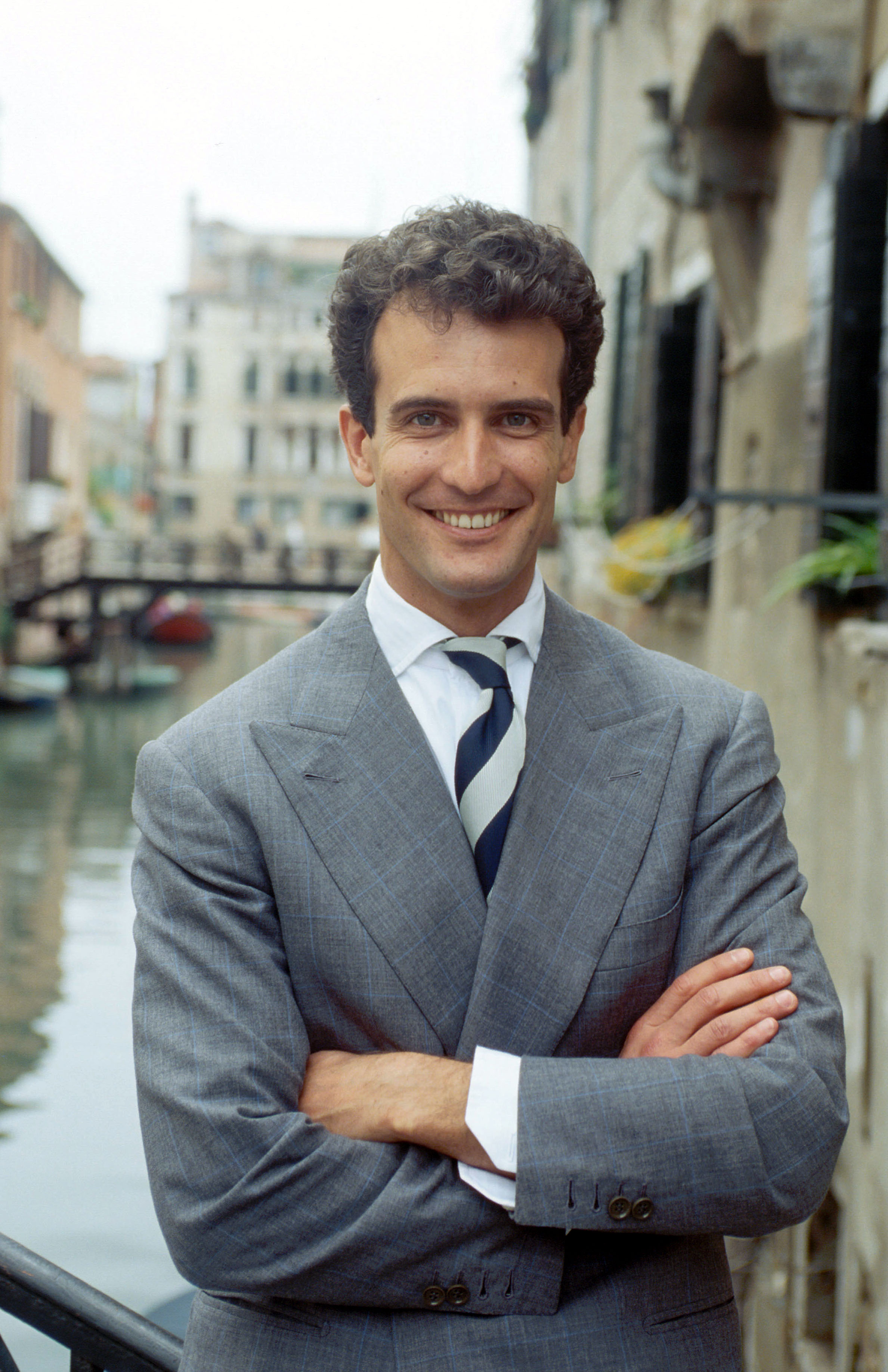 Alessandro Benetton negli anni '90